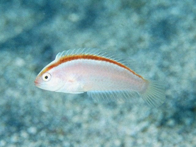 キリクティス・ハルステアディ Xyrichtys halsteadi